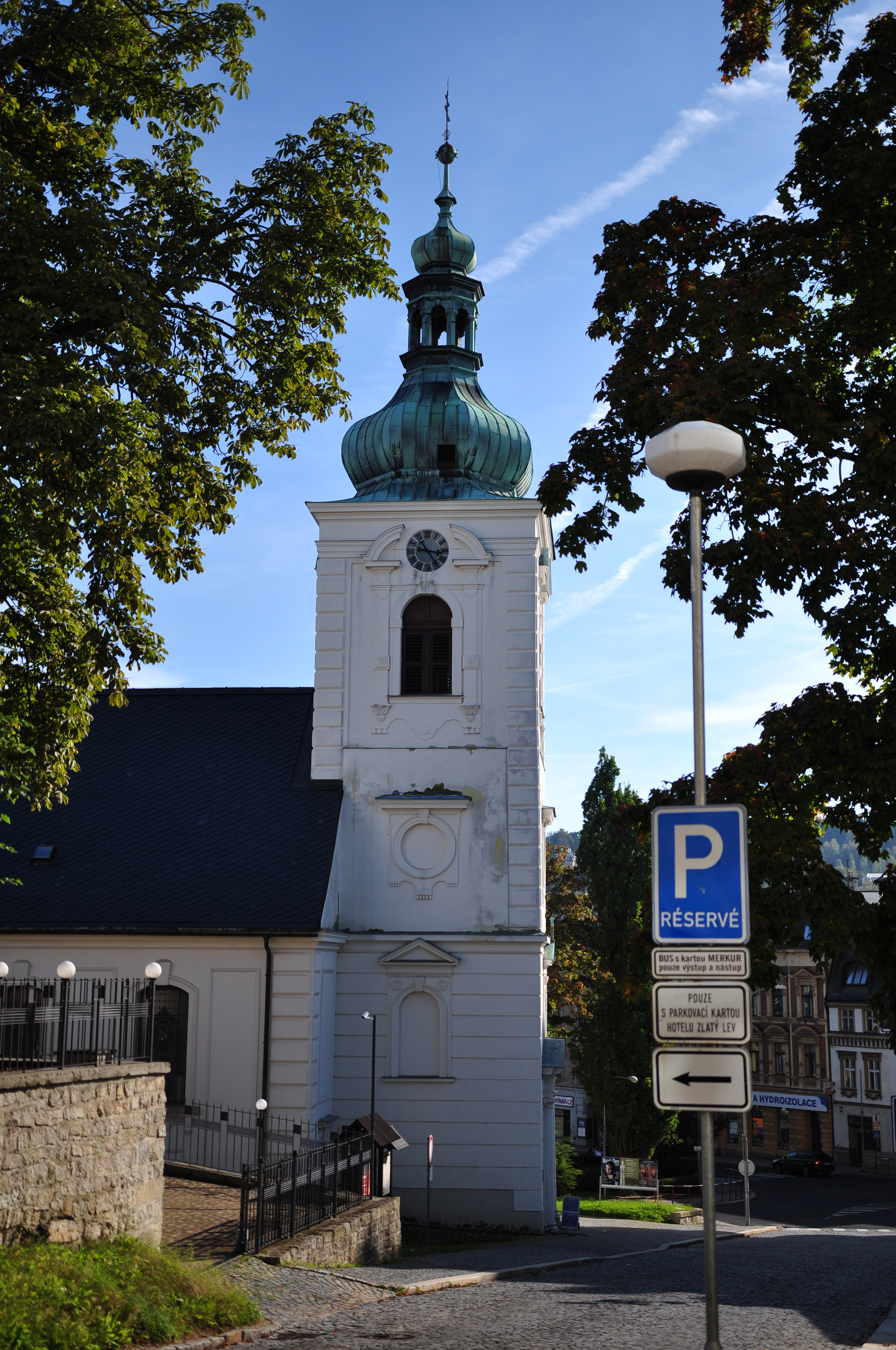 Kostel svaté Anny se sochou Panny Marie Karlovské a smírčím křížem, Kostelní, Anenské náměstí, Soukenná, Anenská, Jablonec nad Nisou.